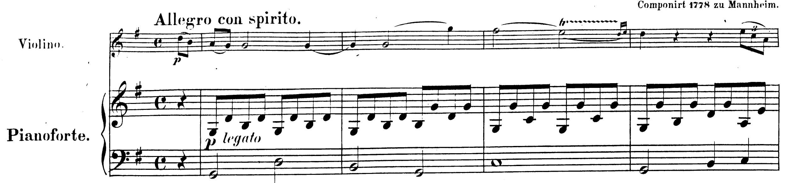 (j'ai les droits car IMSLP)